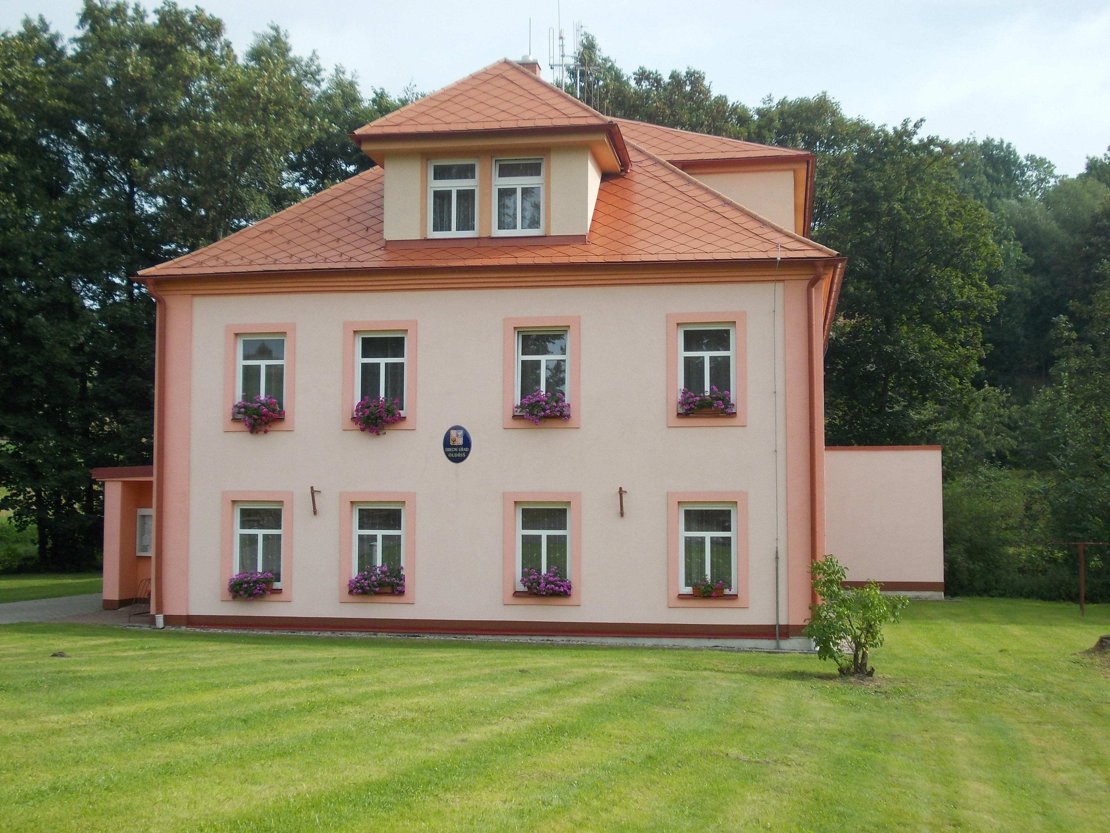 Oldřiš - obecní úřad (č.p. 132)